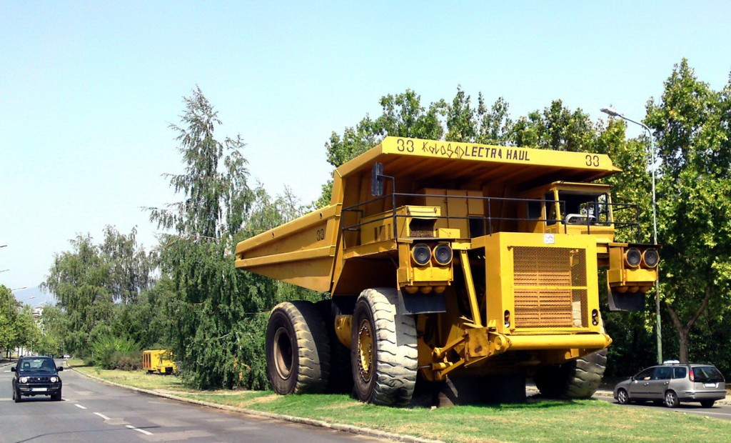 Damper Bor